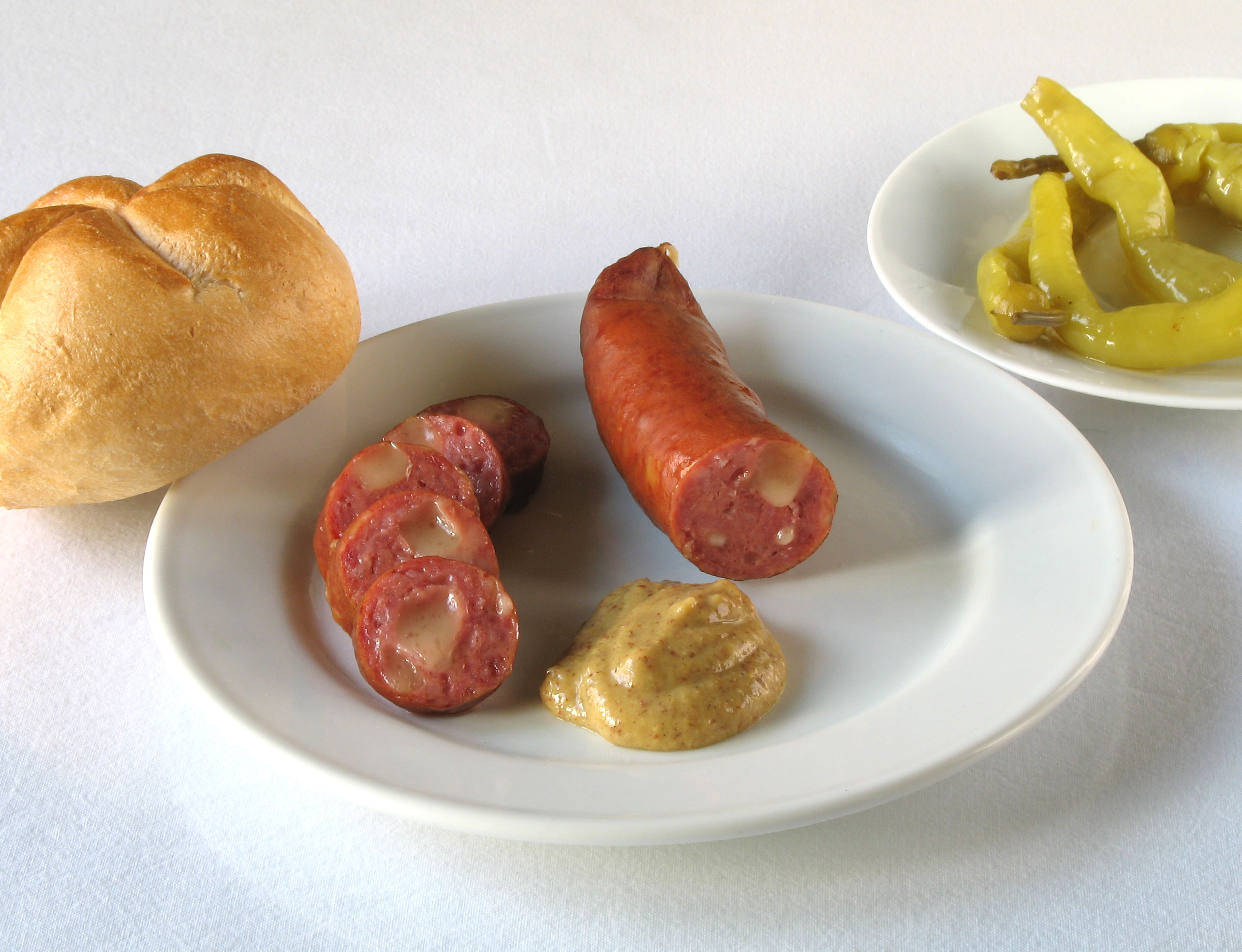 Käsekrainer (Austrian sausages) mit süßem Senf (Kremser Senf), Semmel und Ölpfefferoni.